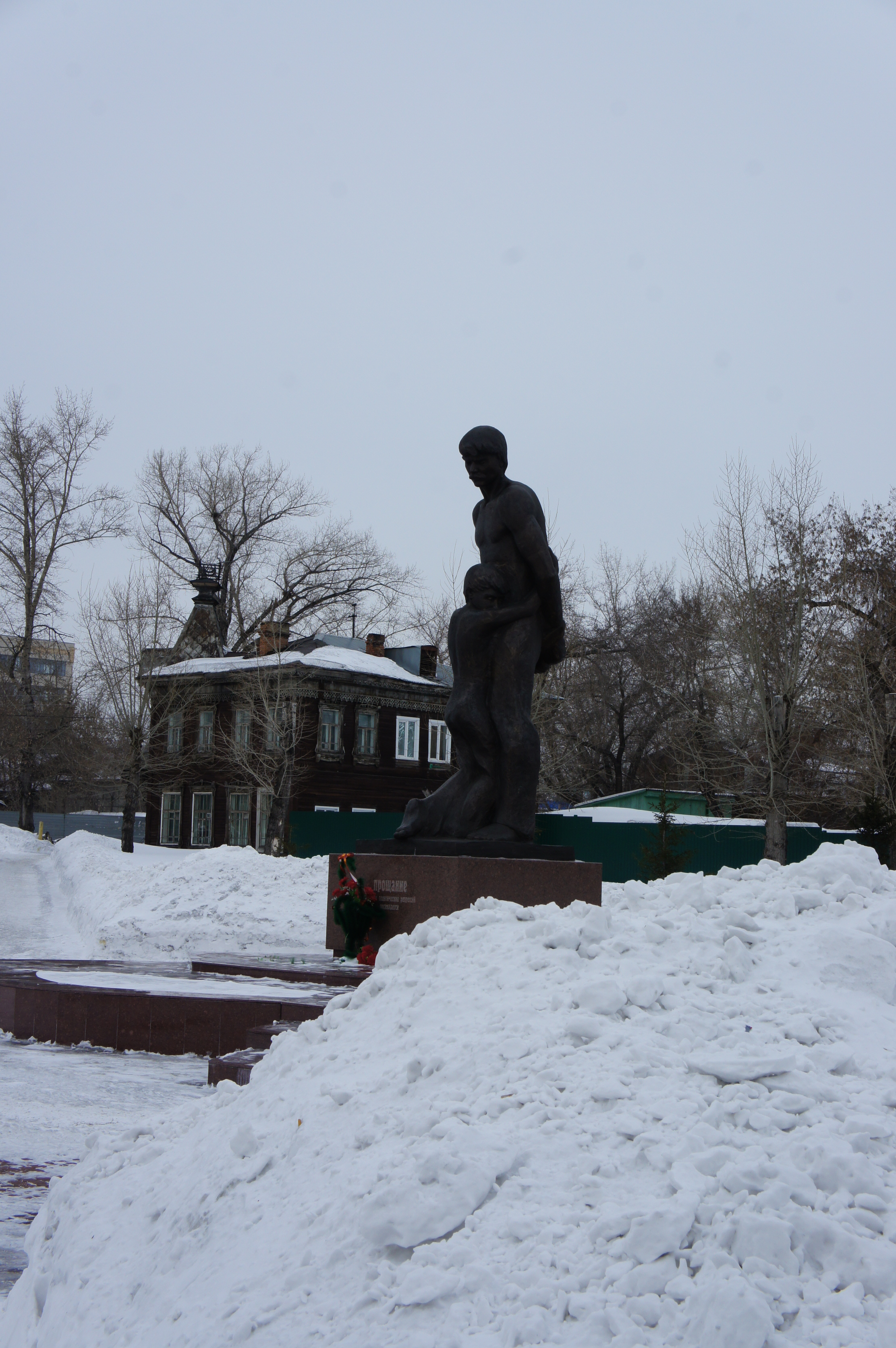 Памятник жертвам политических репрессий, пл. Свободы, г. Барнаул